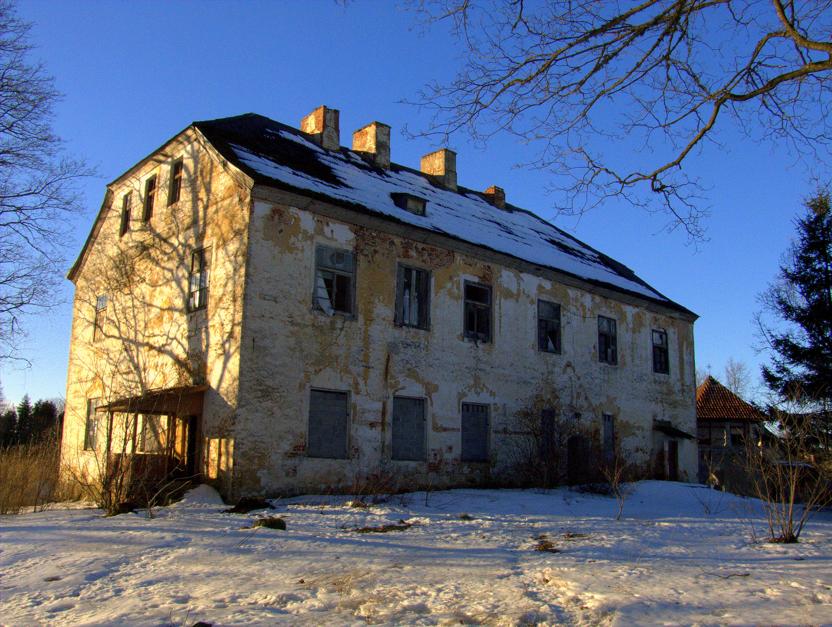 Bramberge manor